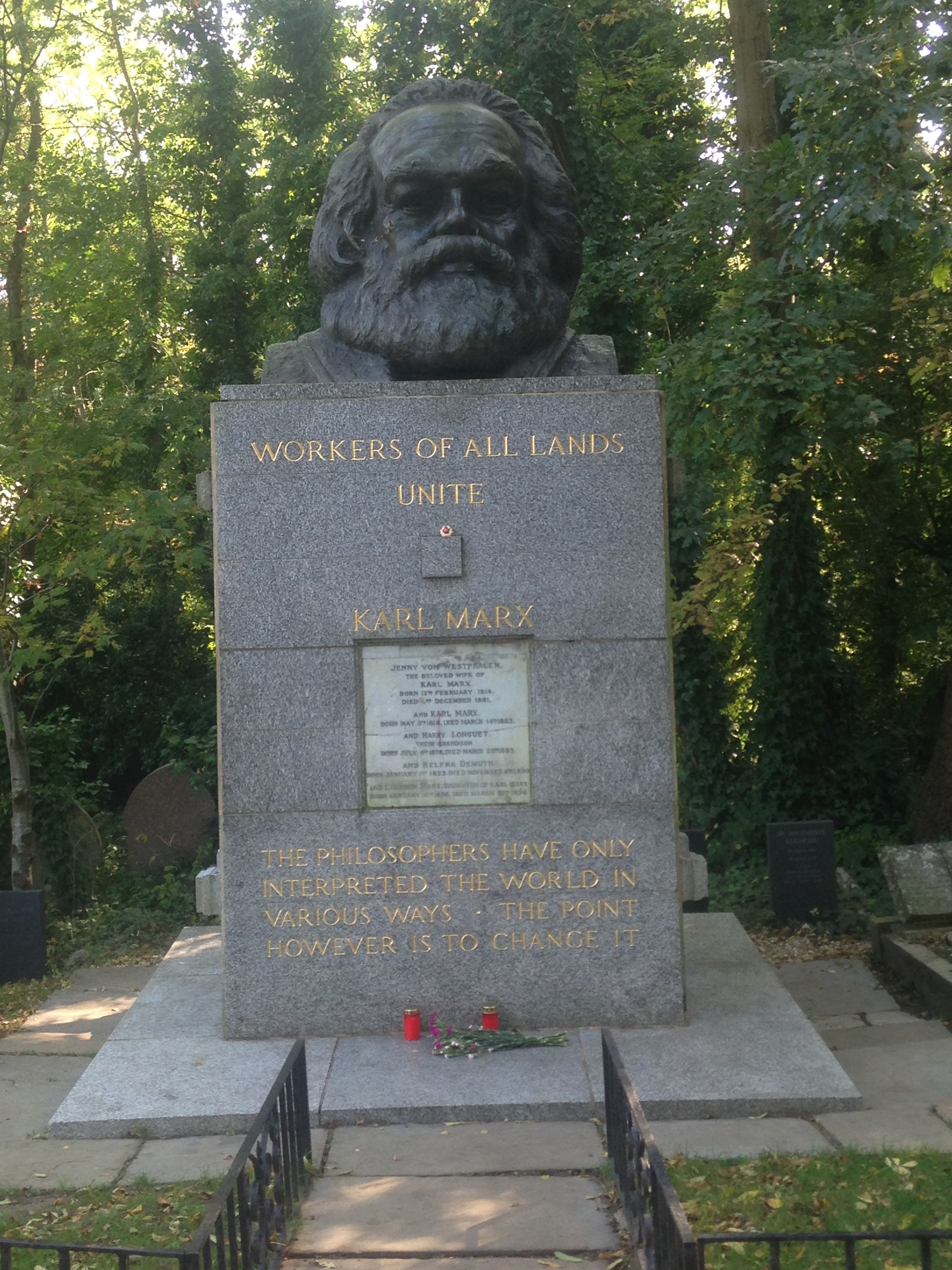 Grób Karola Marksa